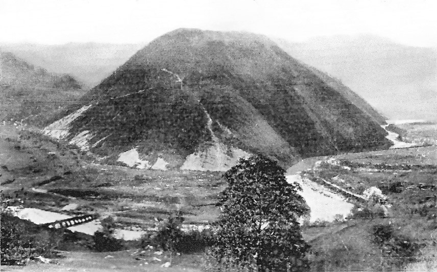 Monta Tomba